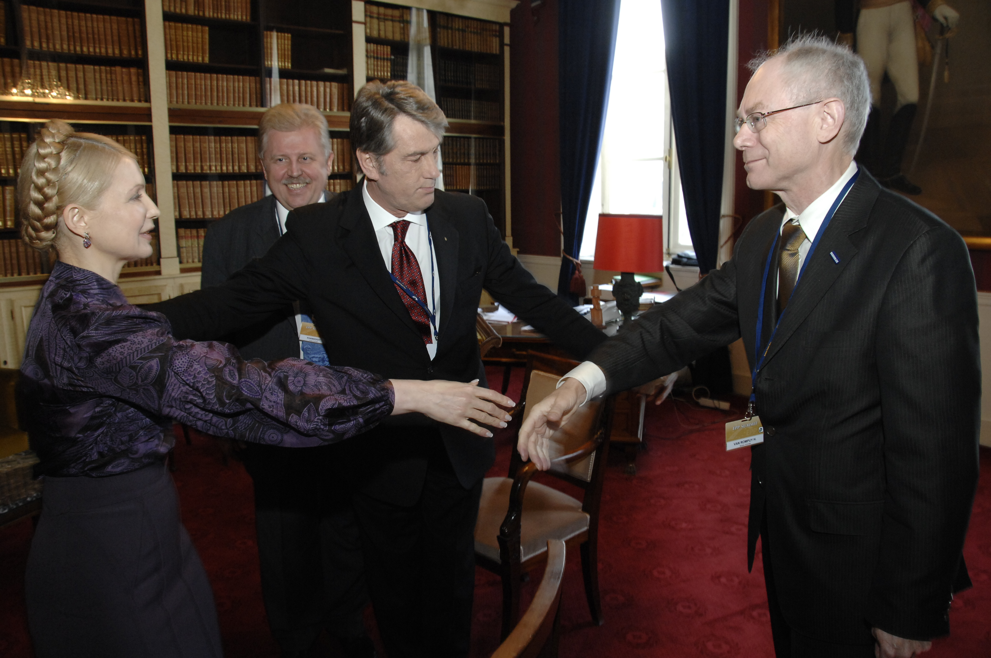 EPP Summit 19 March 2009 (86)